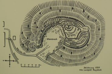 Planskizze_Wolfsbach